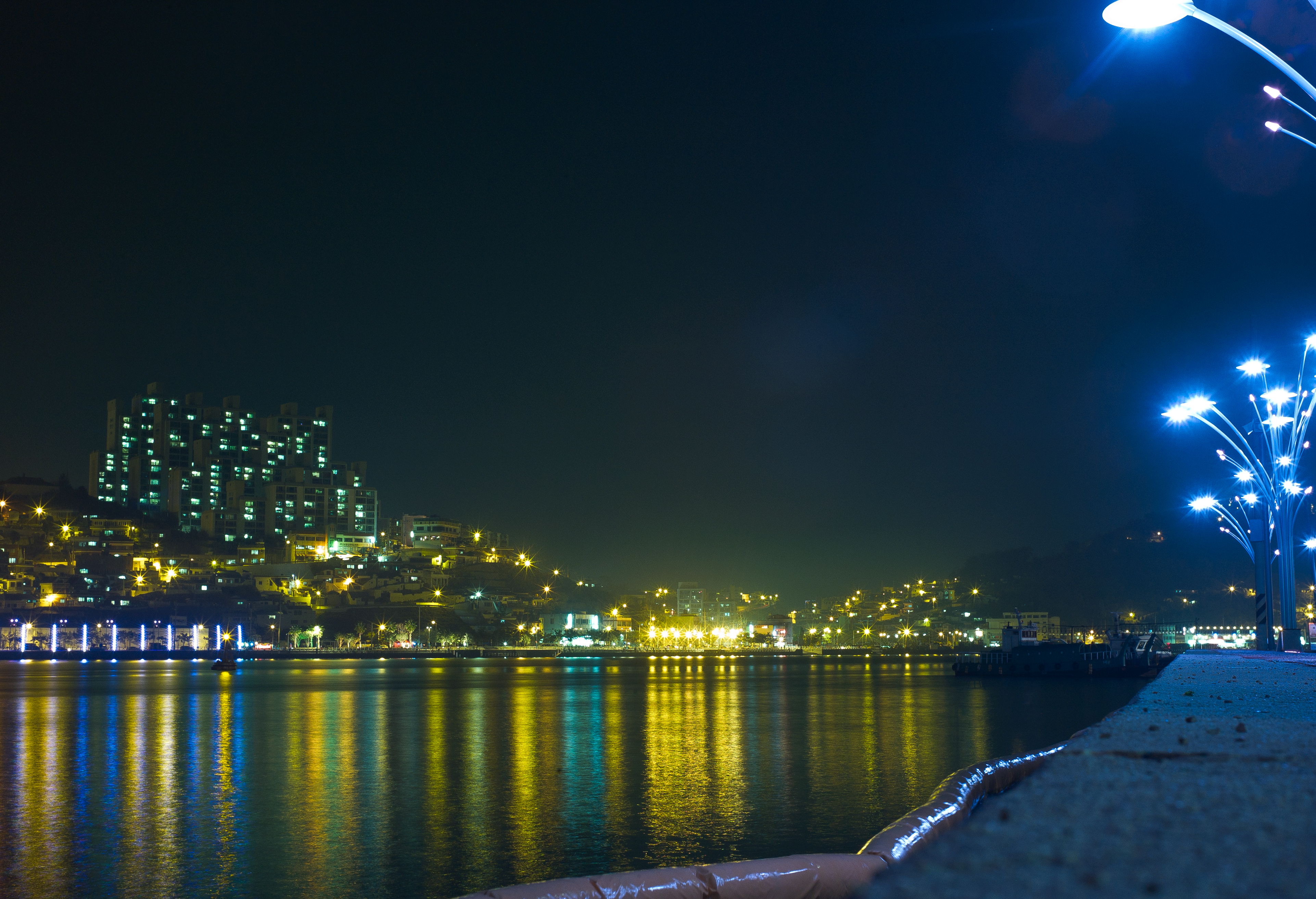 Yeosu by night 3